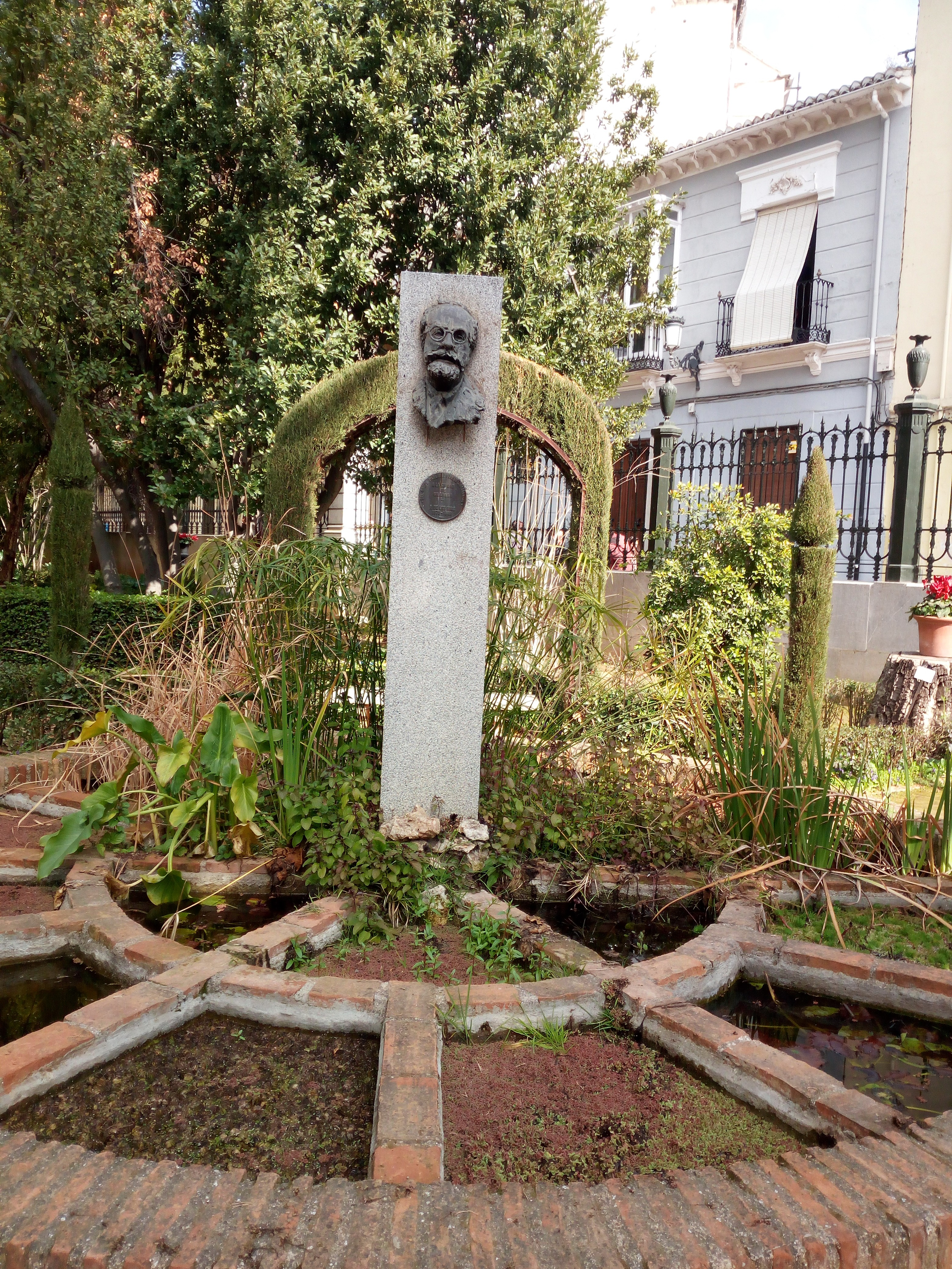 Estanque de acuáticas con monolito homenaje a Fernando de los Ríos en el centro. La glorieta se diseñó con las claves estéticas de la jardinería local granadina del siglo XIX. Jardín Botánico de la Universidad de Granada.